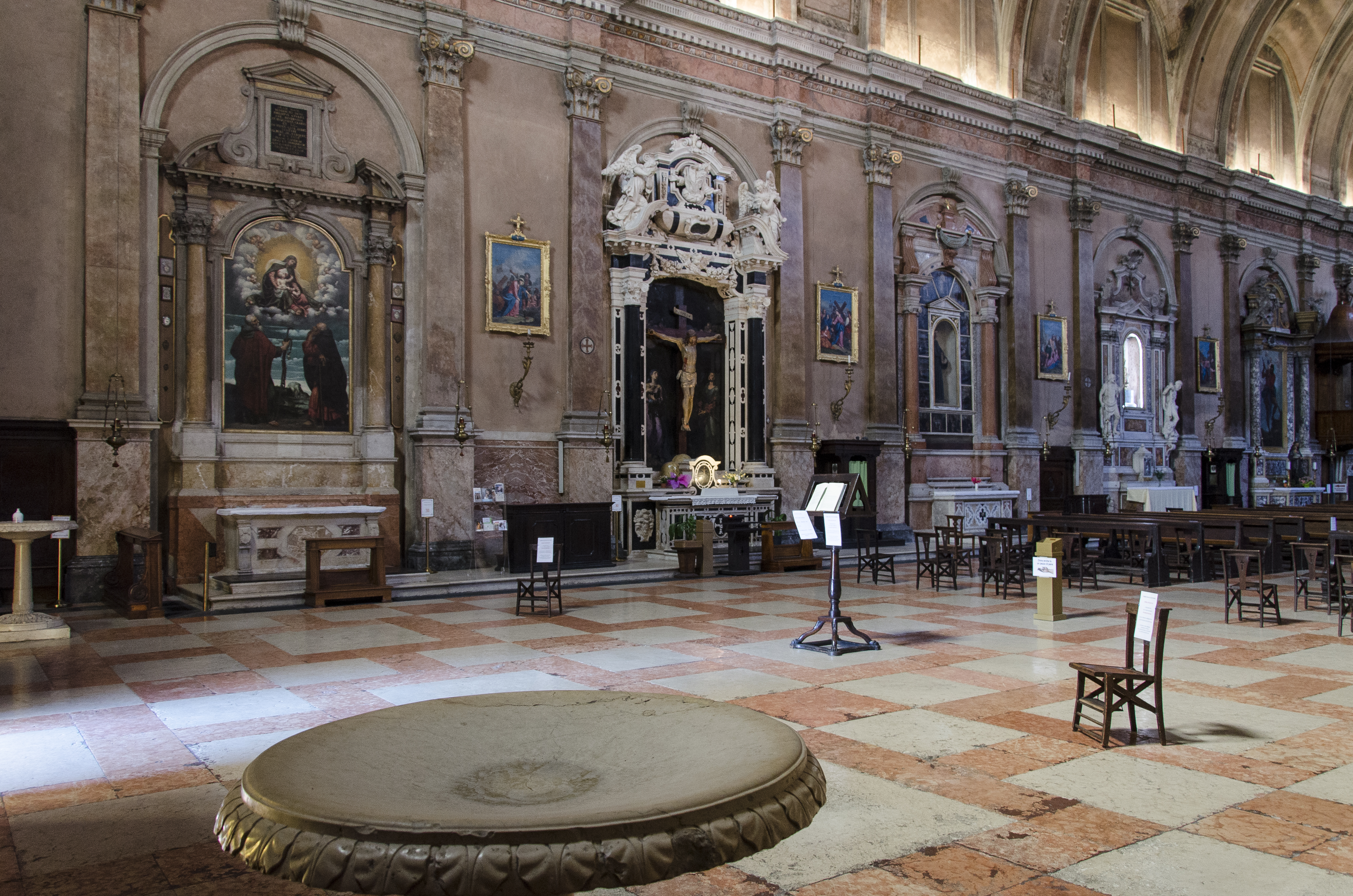 Interno della chiesa di Sant'Eufemia a Verona